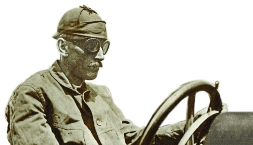 智威·克里斯蒂